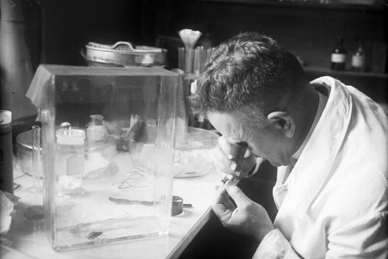 Interessantes aus der Preussischen Landesanstalt für Wasser-, Boden- und Lufthygiene in Berlin-Dahlem! Die Forschungen und Arbeiten der Preussischen Landesanstalt für Wasser-, Boden - und Lufthygiene sind für die Volkshygiene äusserst wertvoll. An Hand hygienischer Versuche an Pflanzen und Tieren wird die Übertragung von Bazillen wissenschaftlich festgestellt und deren Gegenmassnahme erprobt. Das Einflössen von Giftstoffen bei einer großen Küchenschabe zur Prüfung der Wirkung des Giftes zwecks Vernichtung von Ungeziefer.